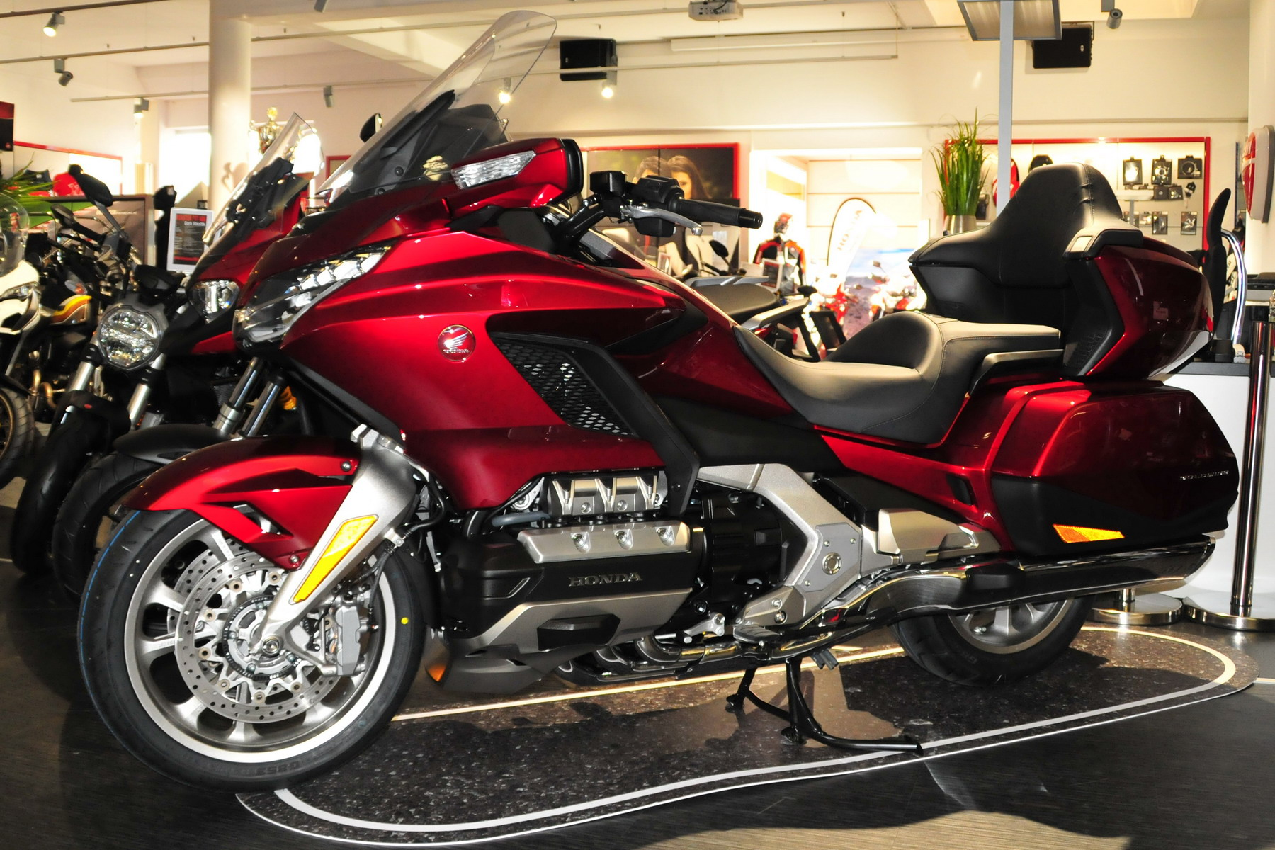 Honda Gold Wing GL 1800 (SC79 - 2018) in Neureichenau